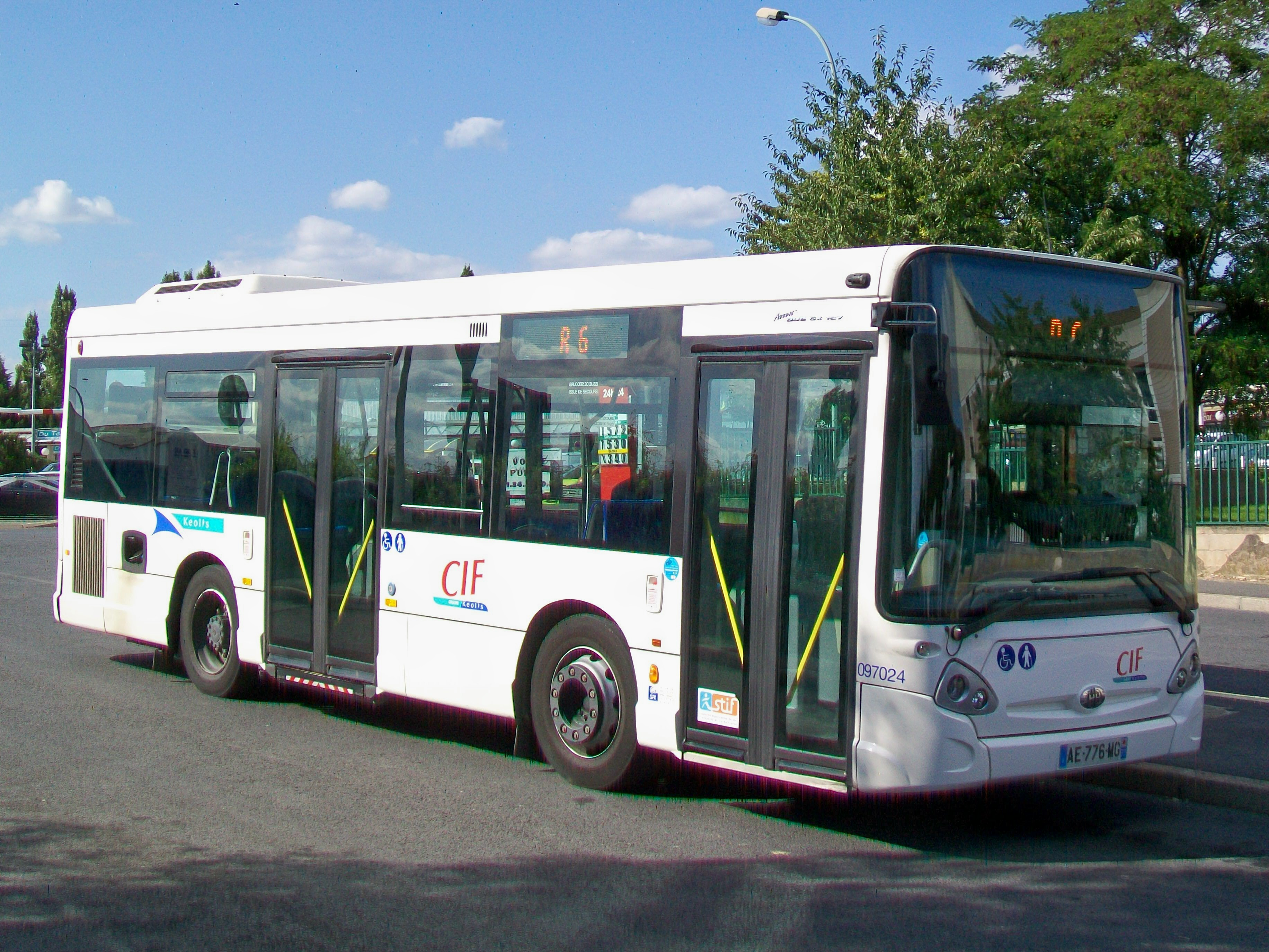 Louvres (95), gare routière (à côté de la gare SNCF), midibus Heuliez GX 127 des CIF sur la ligne R6 - desserte urbaine gare / centre-ville.